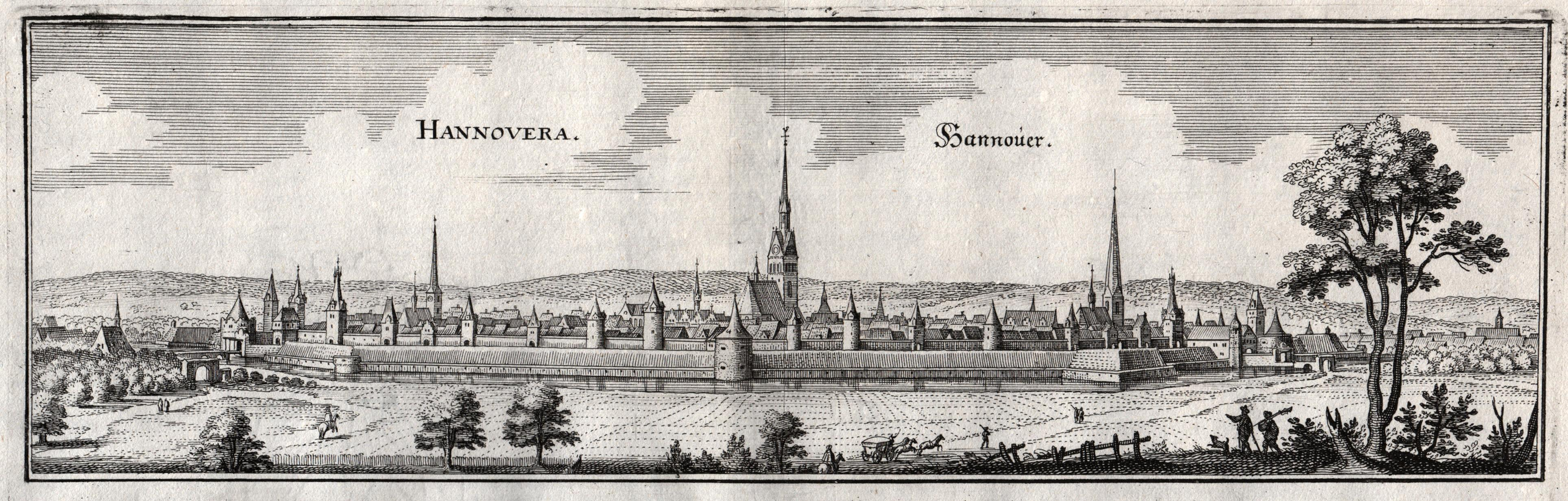 1641 erstmals in dem von Johann Angelii Werdenhagan's Werk De rebus publicis Hanseaticis tractatiis veröffentlichter Kupferstich „Hannovera“ bzw. „Hannouer“. Das Bild zeigt die Stadt Hannover vom Nordosten (Vergleiche Spiege Online). Ganz links im Vordergrund ist die zwecks Erweiterung der Befestigungsanlagen der Stadt Hannover abgebrochene Marienkapelle zu sehen, ganz rechts im Vordergrund die Nikolaikapelle ...